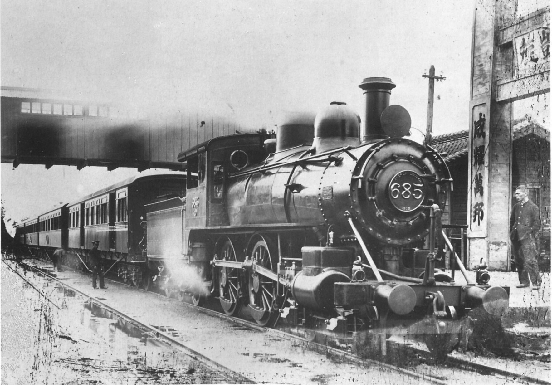 685、後の6425。国鉄6400形蒸気機関車。当初はD12形（660 - 689）だったが、1909年に6400形（6400 - 6429）に形式が改められた。「凱旋」「威耀萬邦」と書かれた凱旋門が見え、出典書籍では「凱旋のアーチが見えるのは日露戦争後の東海道本線沼津駅と思われる」としている。 川上幸義『新日本鉄道史(上)』(1967年、鉄道図書刊行会)での同一写真の解説では、「試運転列車と思われる」「客車は全部新造の6輪ボギー車である」「沼津 明治39年 臼井茂信所蔵」とある。明治時代